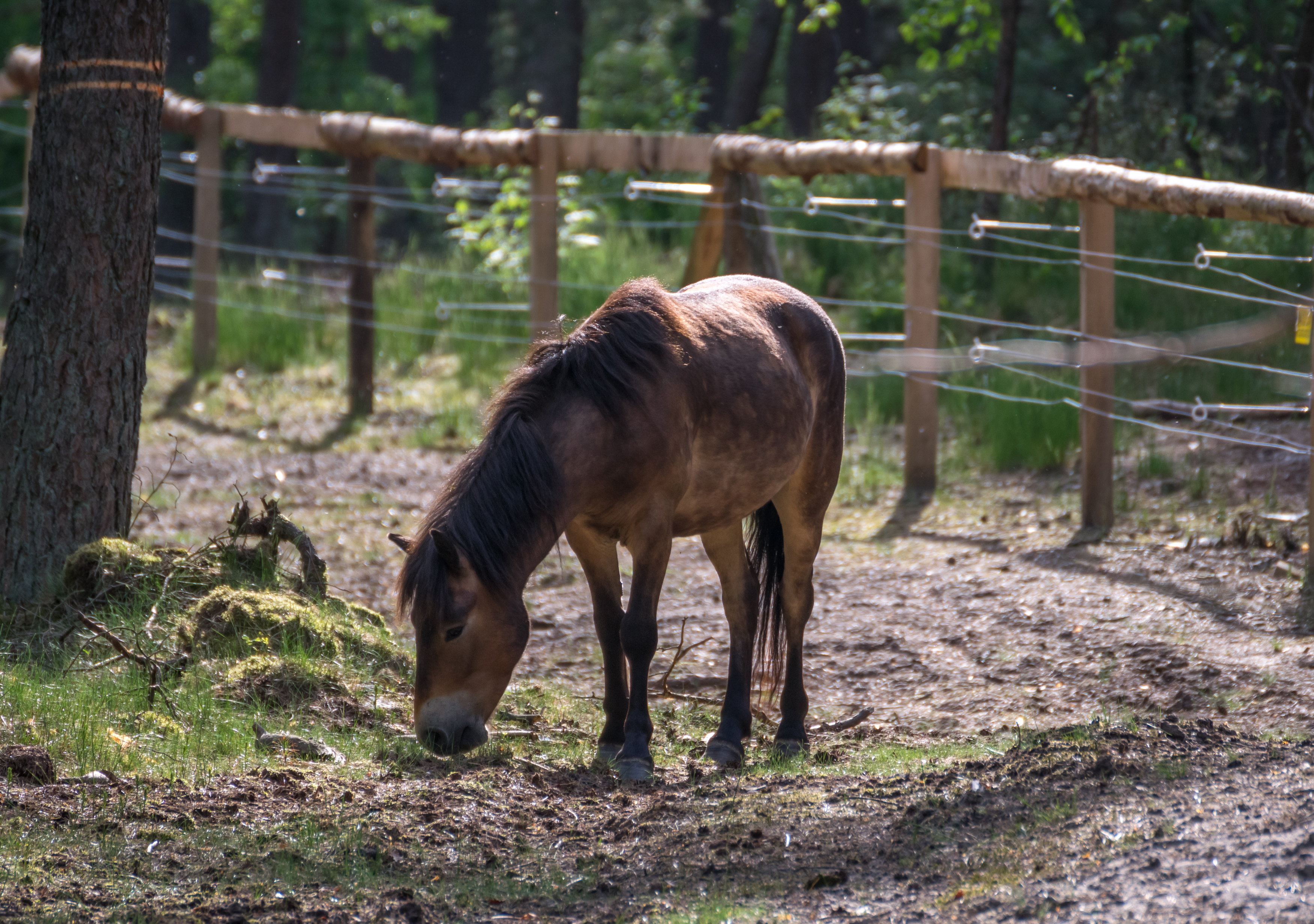 Exmoor-Ponys im Naturschutzgebiet Ölbachtal mit Augustdorfer Dünenfeld, Augustdorf, Kreis Lippe